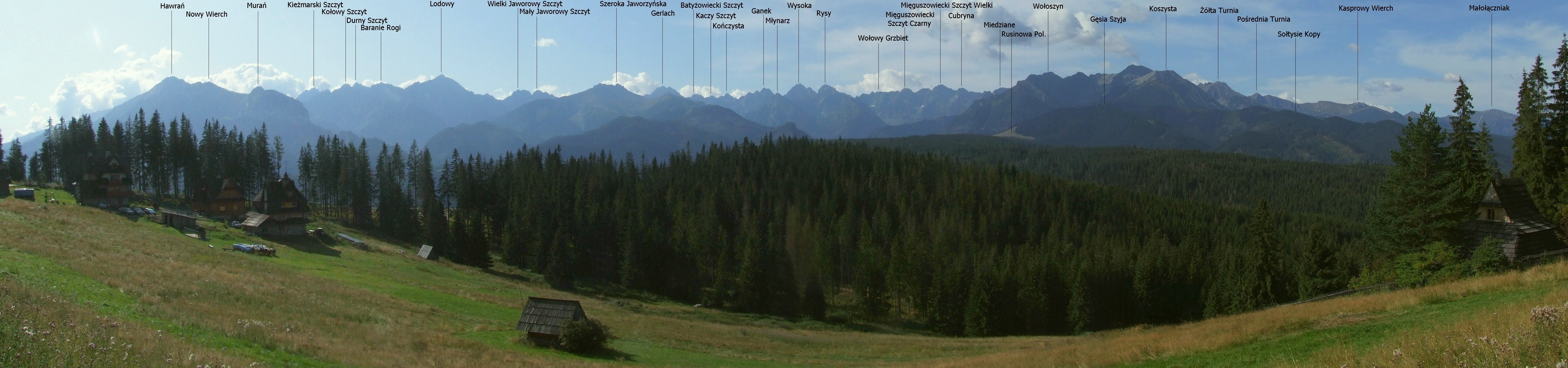 Panorama Tatr z Głodówki